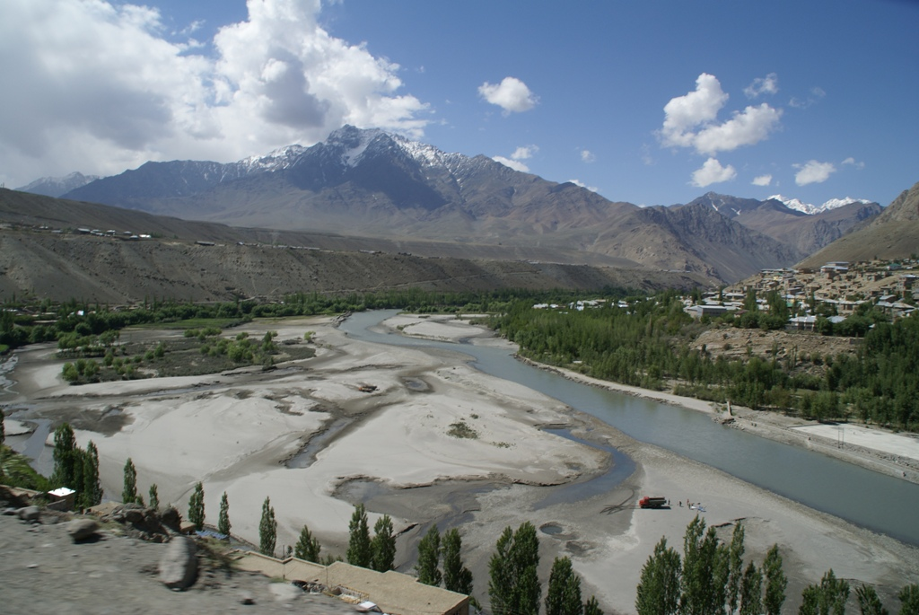 Suru river near Kargil. Jammu and Kashmir, India.